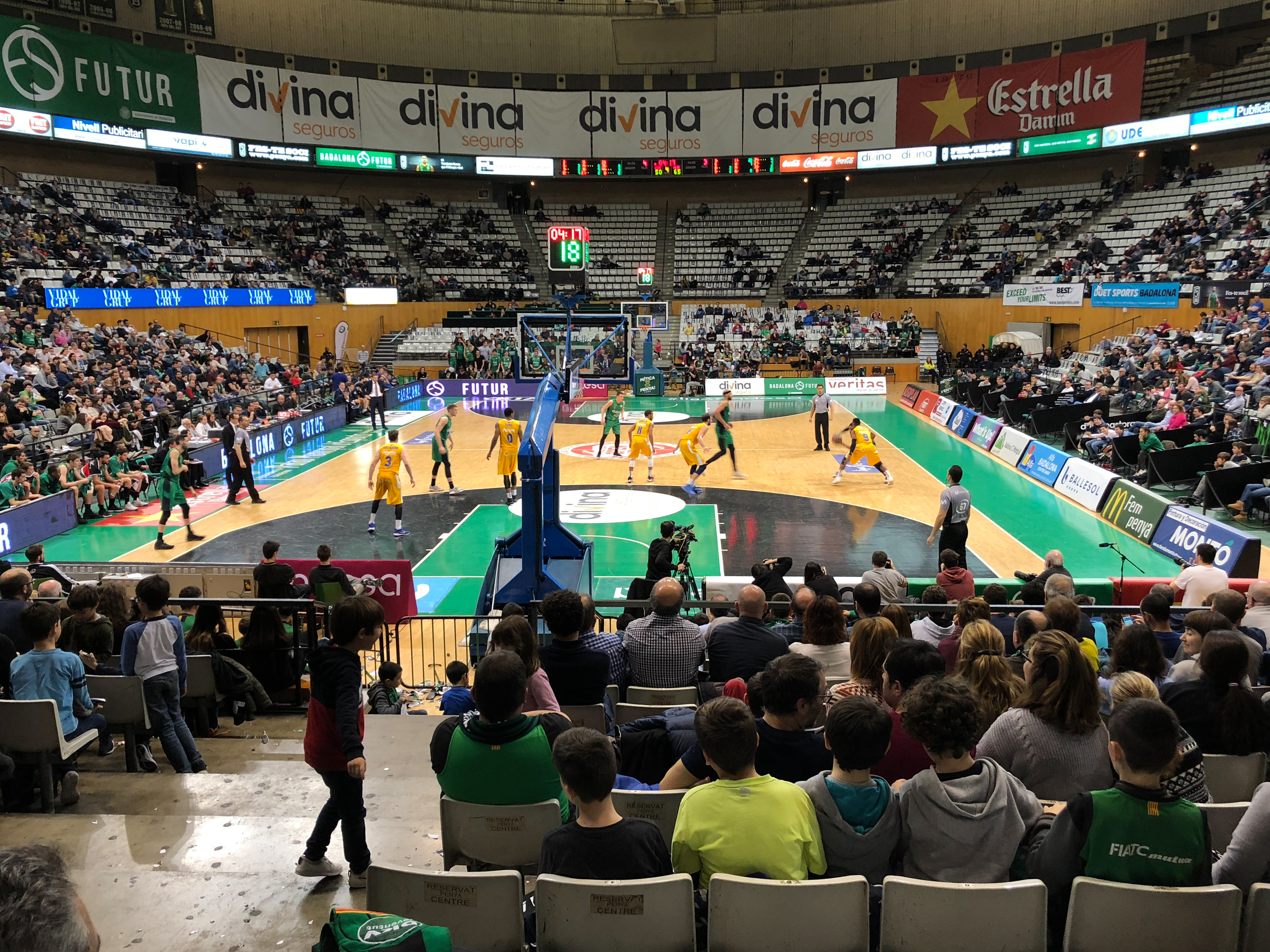 Partit de Lliga ACB entre el Divina Seguros Joventut i l'UCAM Murcia al Palau Olímpic de Badalona.